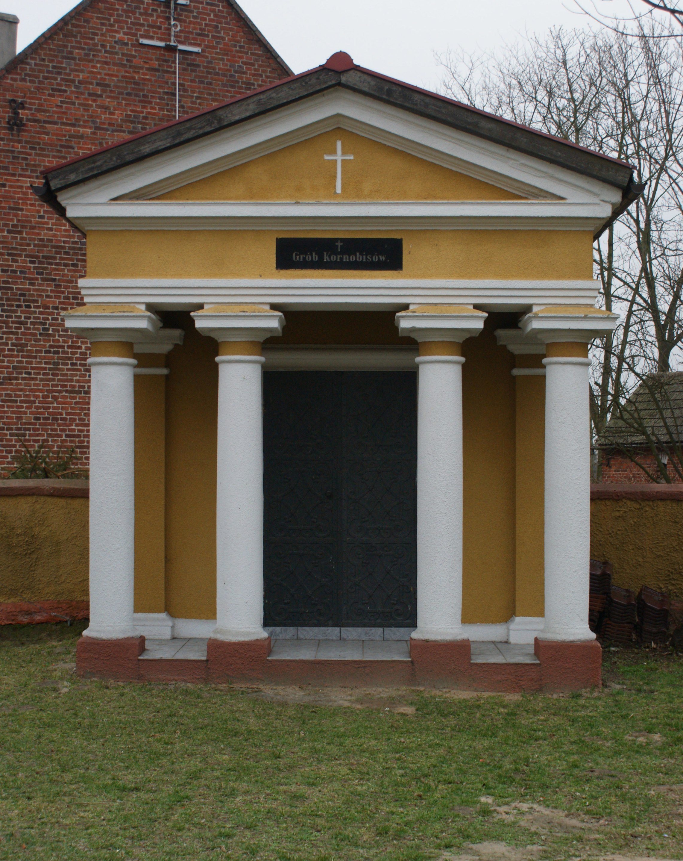 zespół kościoła parafialnego: kościół pw. św. Mikołaja z XVI/XVII, 1640, XVIII w., dzwonnica drewniana z końca XIX w., cmentarz przy kościele, Dom Katolicki z 1912, 1935 r., plebania z 3. ćw. XIX w., park plebański z sadem z końca XIX w. Gostyczyna, Nowe Skalmierzyce